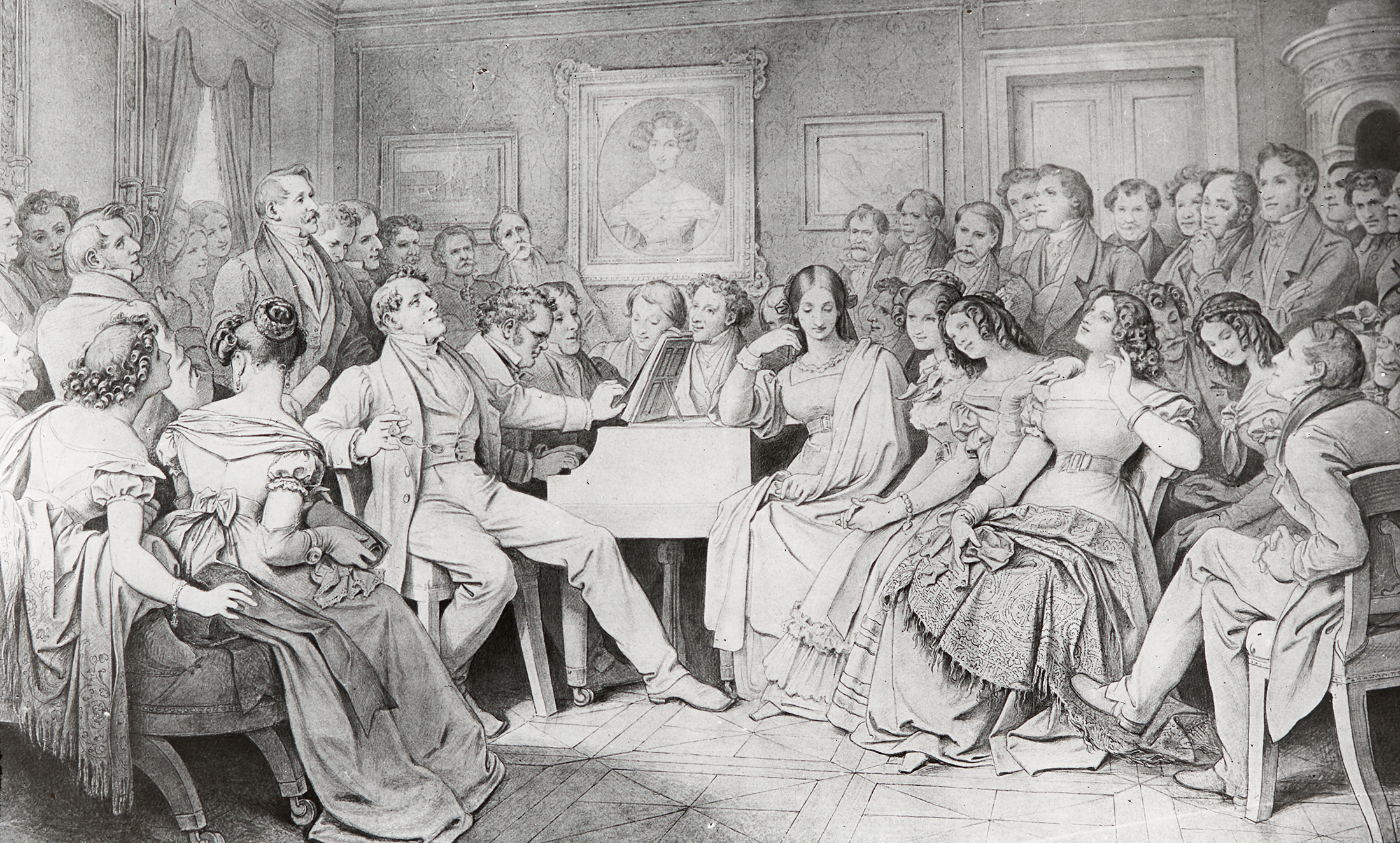 aus der Erinnerung gezeichnet Das Bild zeigt Franz Schubert am Klavier sowie Josef von Spaun, Johann Michael Vogl, Franz Lachner, Moritz von Schwind, Wilhelm August Rieder, Leopold Kupelwieser, Eduard von Bauernfeld, Franz von Schober, Franz Grillparzer und auf dem Bild an der Wand Komtess Karoline Esterházy.